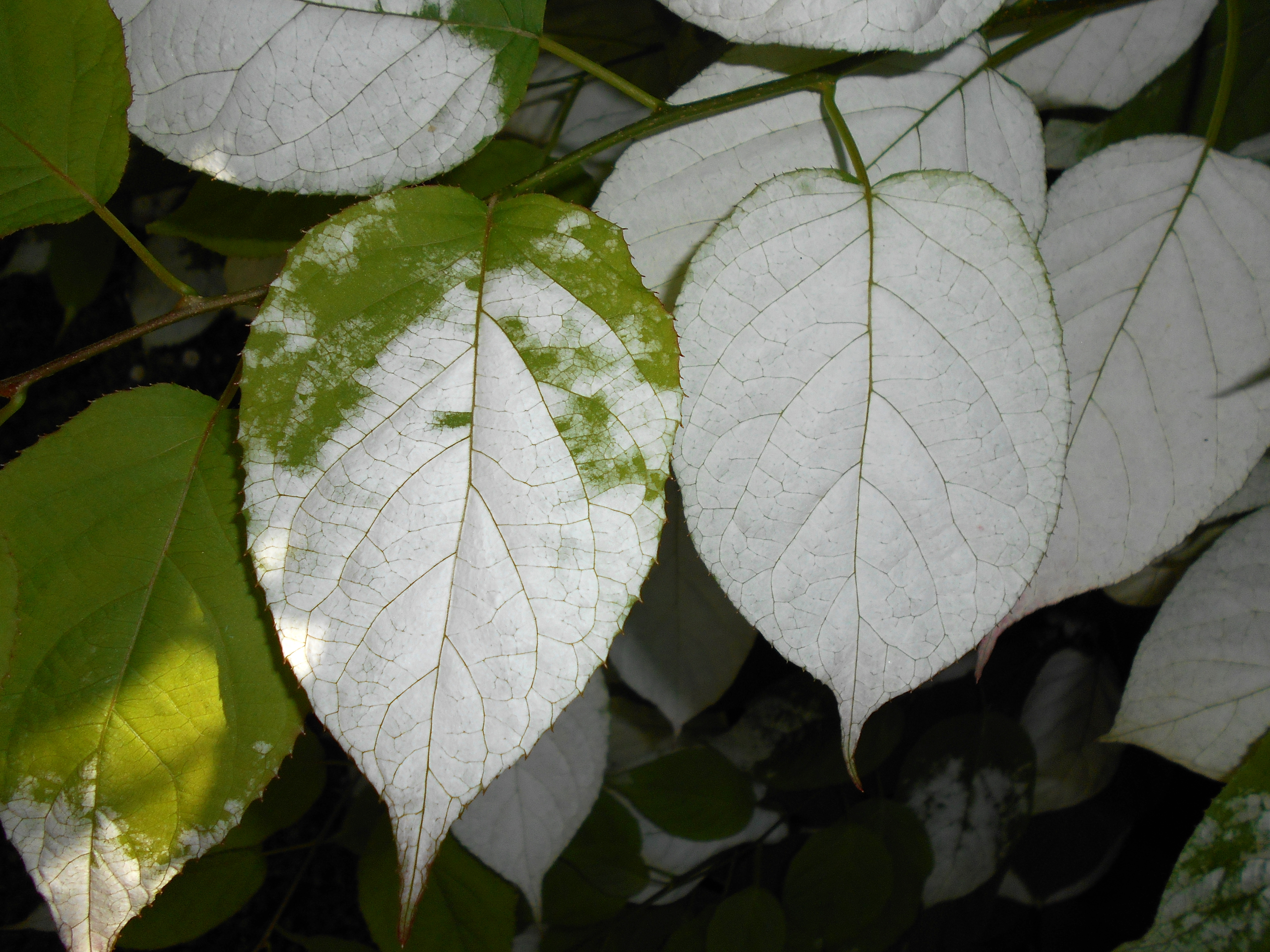 Aktinidia pstrolistna (Actinidia kolomikta), Ogród Botaniczny UMCS, Lublin, Polska.